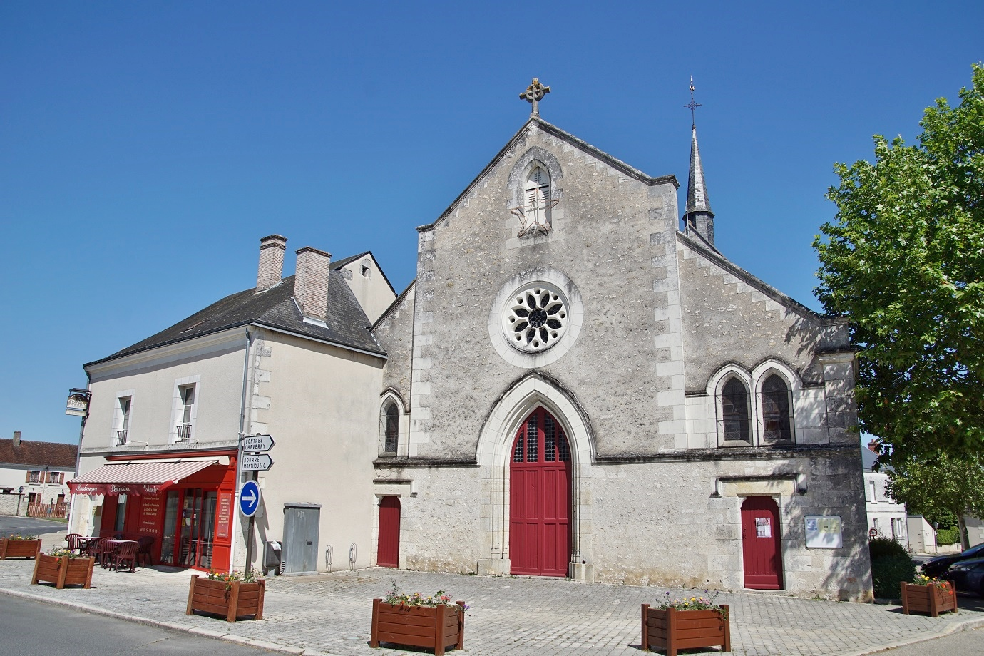 Loir et Cher